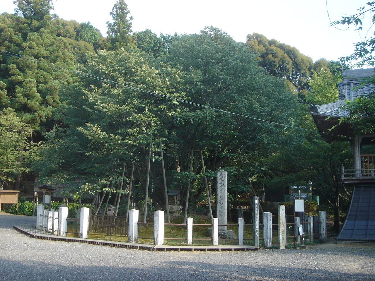 Ganjoji(Temple) in Gifu(願成寺 (岐阜市)のw:ja:中将姫誓願桜(8月)),Gifu,Gifu,Japan(岐阜県岐阜市)で撮影